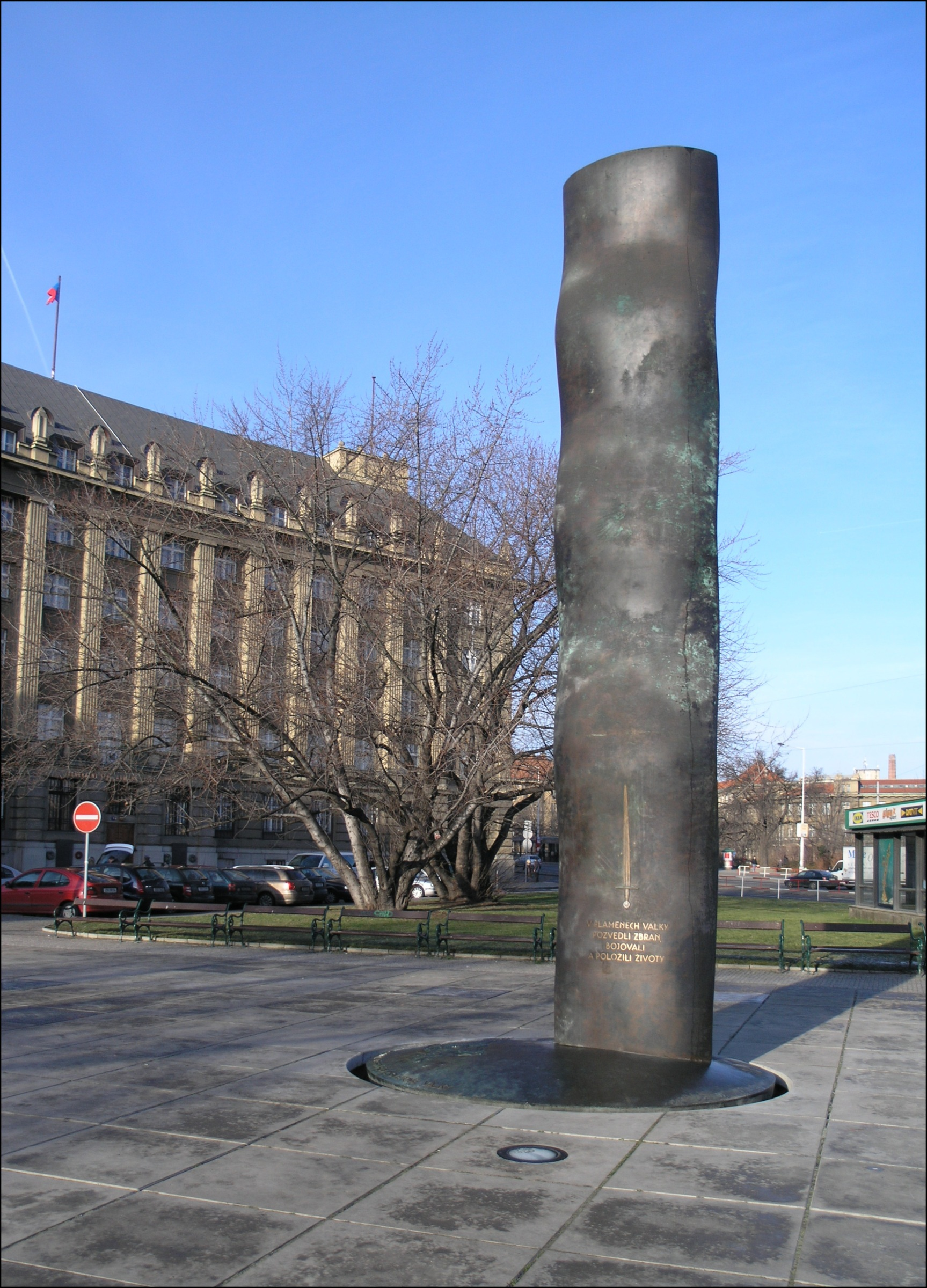 Praha, Dejvice - památník zahraničním vojákům